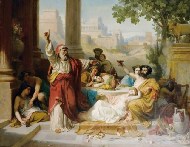 Jérémie reprochant aux juifs leurs déréglements